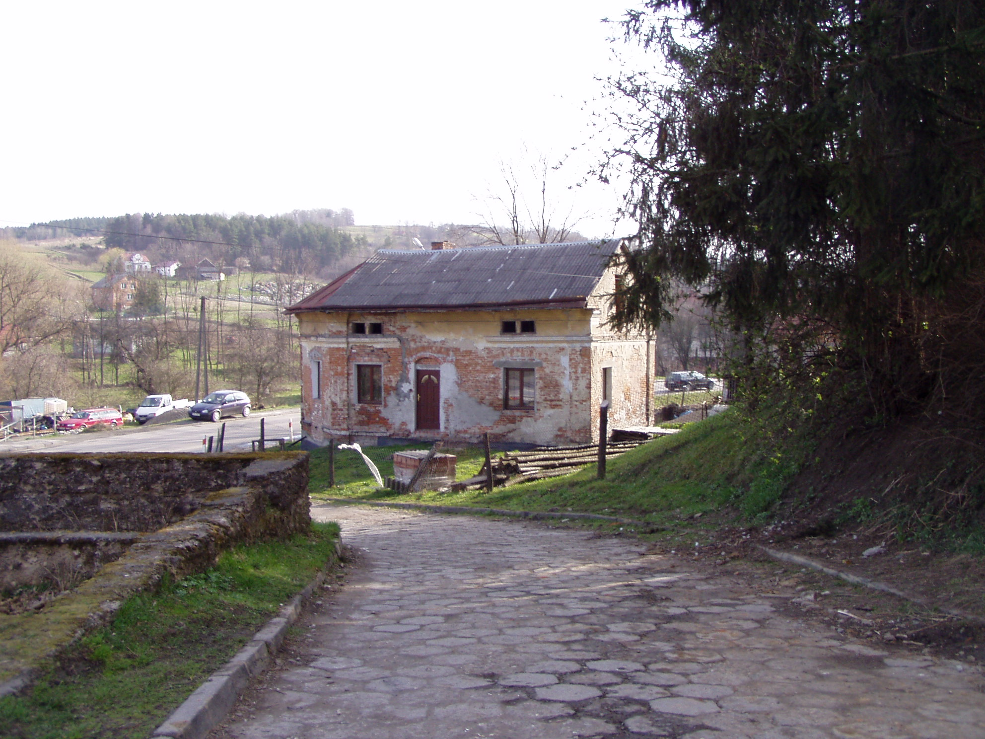 Bircza. Building of the old mikvah. Budynek dawnej mykwy w Birczy.